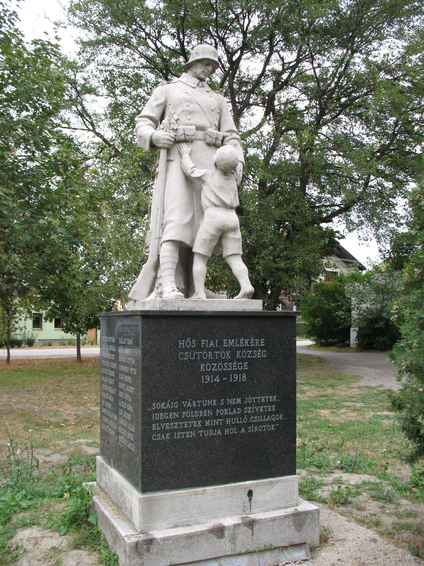 Csütörtök